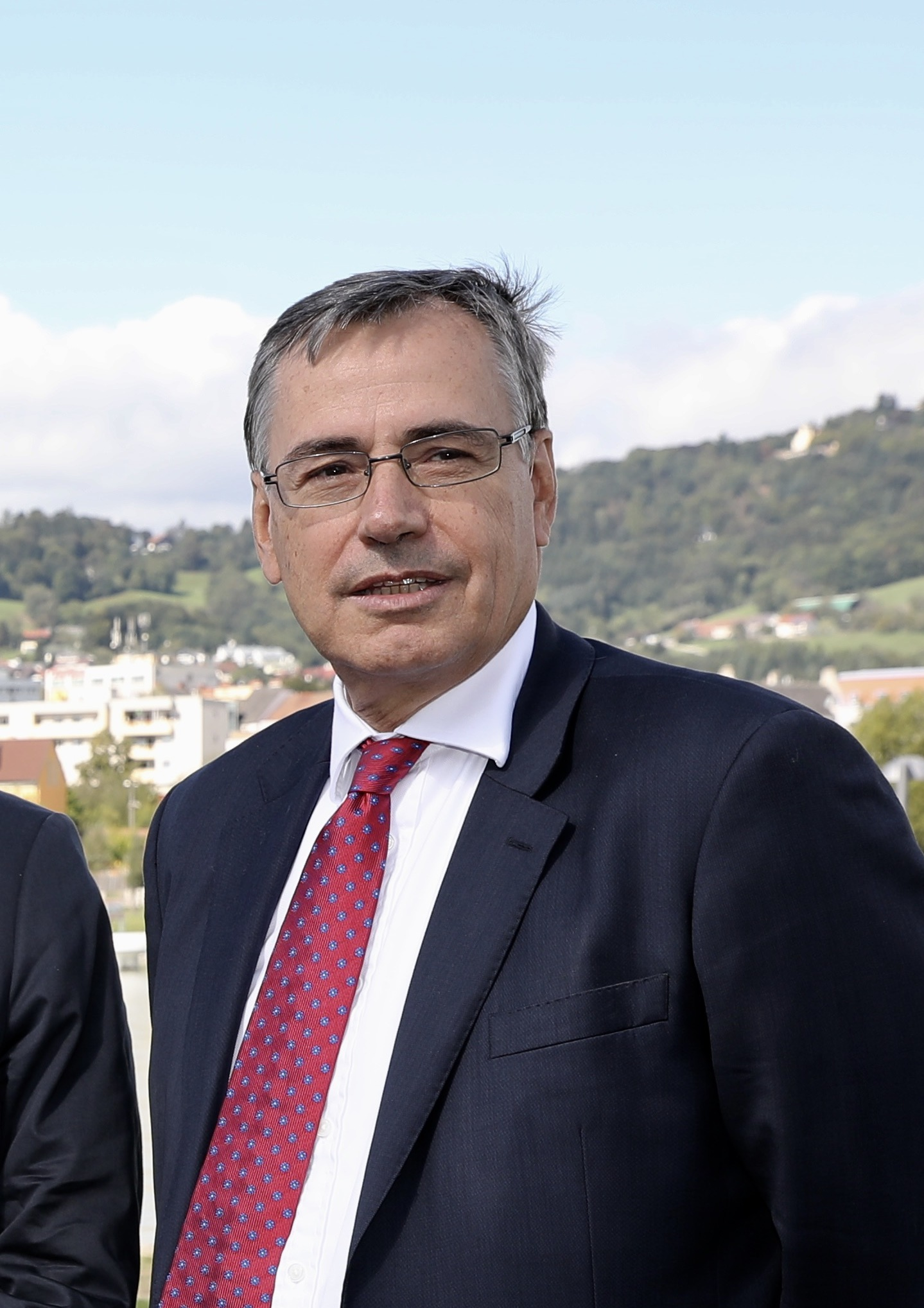 Am 15.9. präsentierte Bundeskanzler und SPÖ-Vorsitzender Christian Kern das Steuerkonzept der SPÖ "Österreich entlasten - aber gerecht!". Mit dabei waren auch die Expertin der FH des bfi Elisabeth Springler, Heinz Zourek, ehem. Leiter der Generaldirektion Steuern und Zollunion, Alois Guger vom Wifo und Steuerberater Andreas Staribacher (Fotos: SPÖ/Roman Zach-Kiesling).